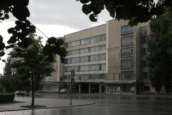 Липецк, Липецкий политехнический институт